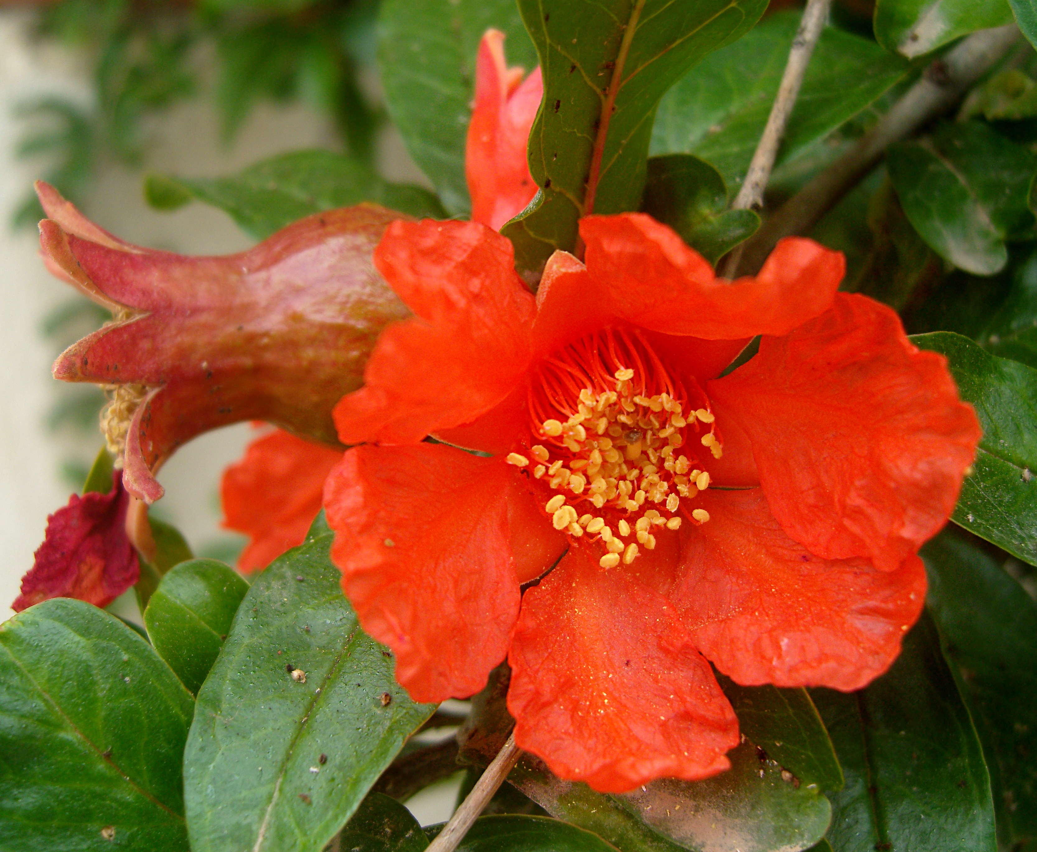 Fleur de grenadier et un jeune fruit